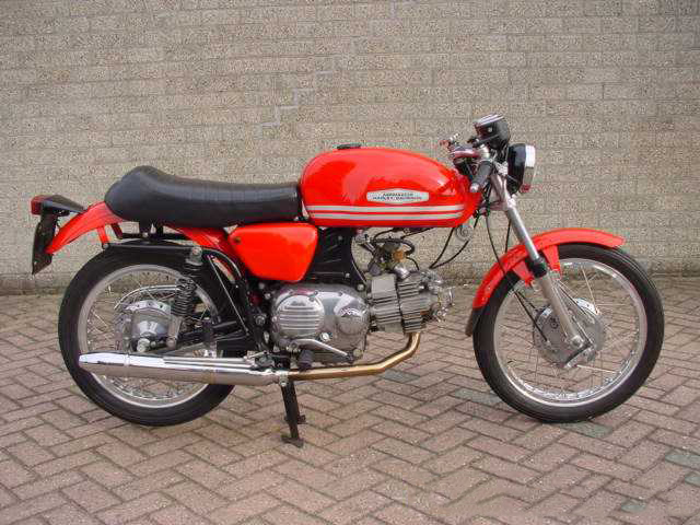 Toestemming van Yesterdays Antique Motorcycles (